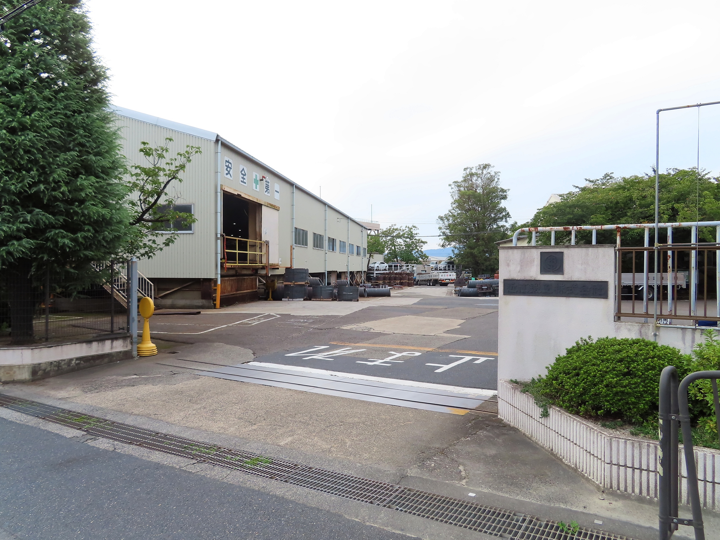 近江鍛工株式会社本社工場（滋賀県大津市）。2017年撮影